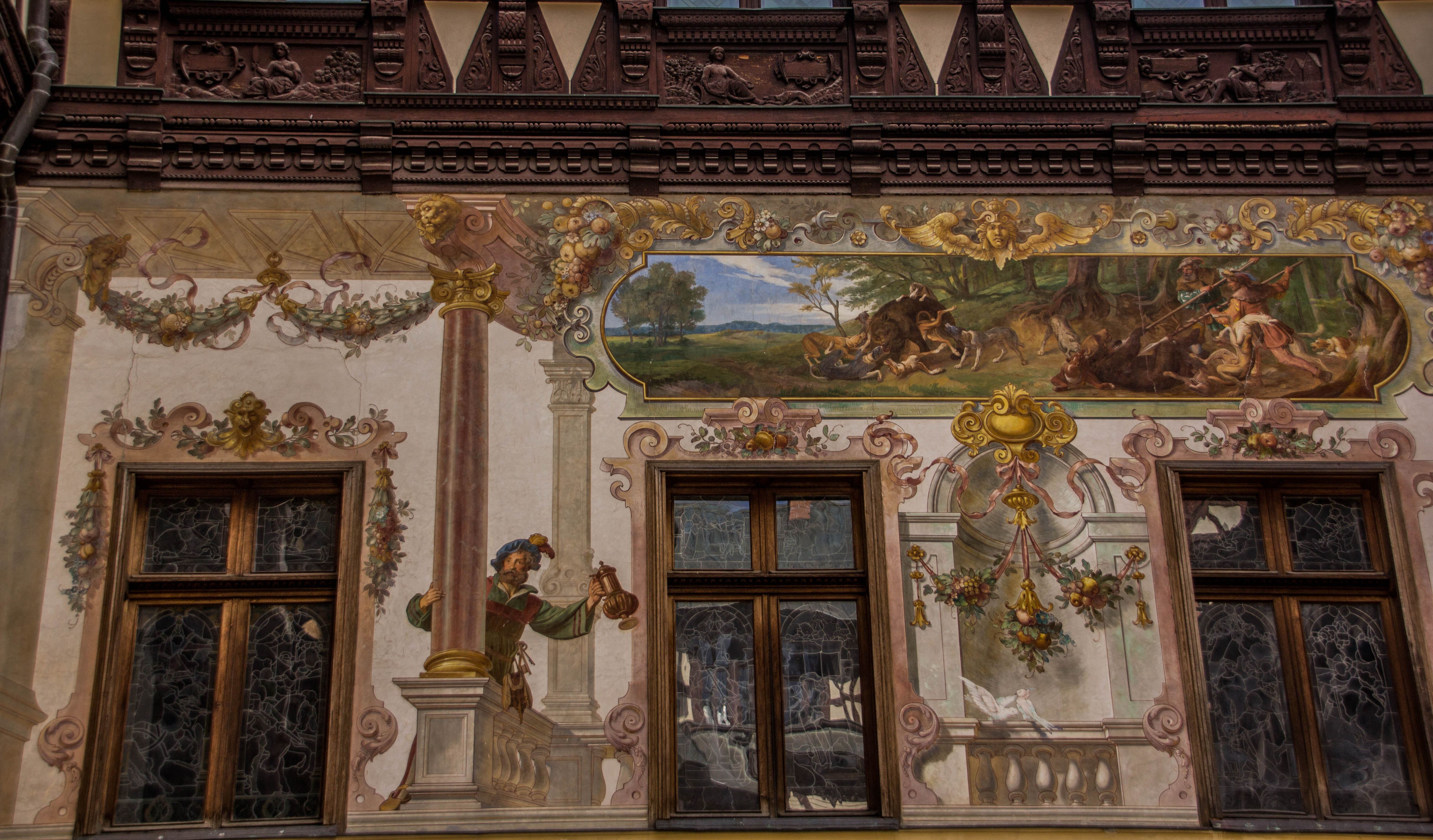 Castelul Peleș 01